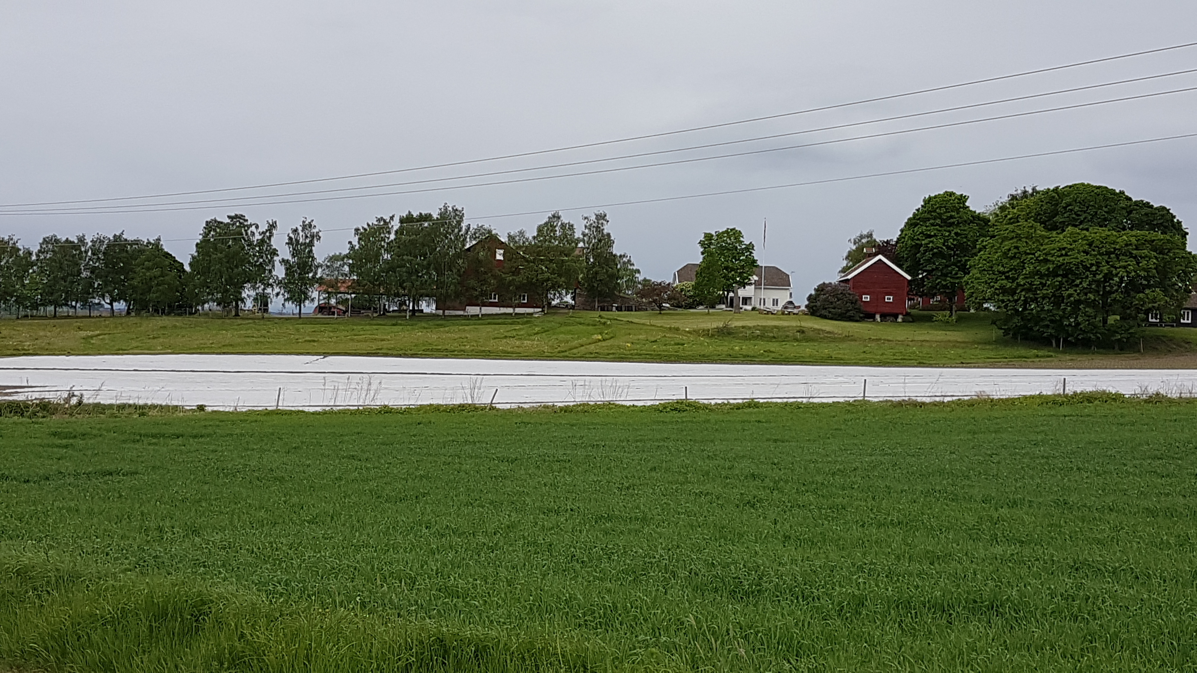 Mo gård i Steinsfjerdingen i Hole kommune, Buskerud